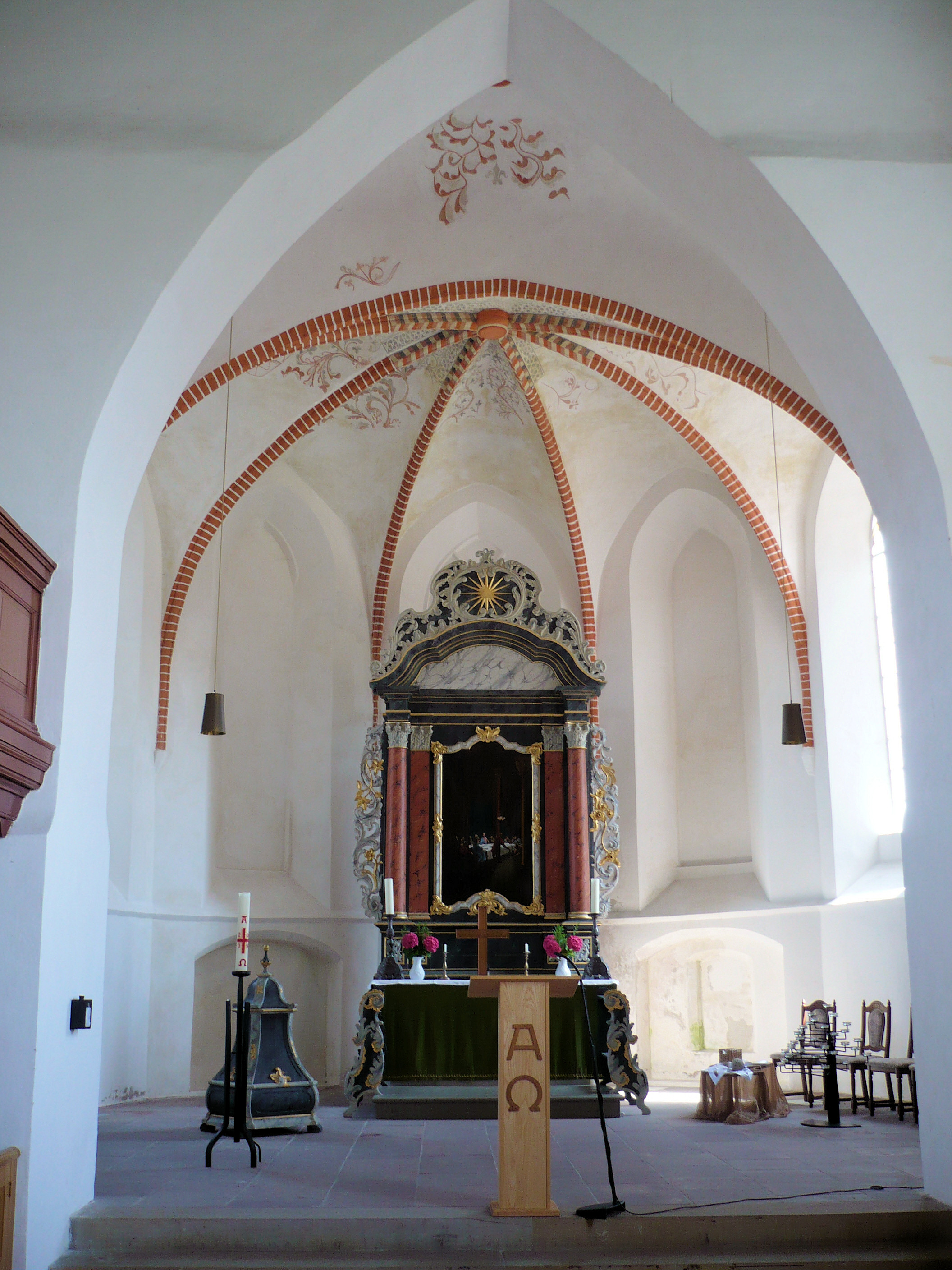 St.-Nicolai-Kirche in Werdum (Innenansicht)